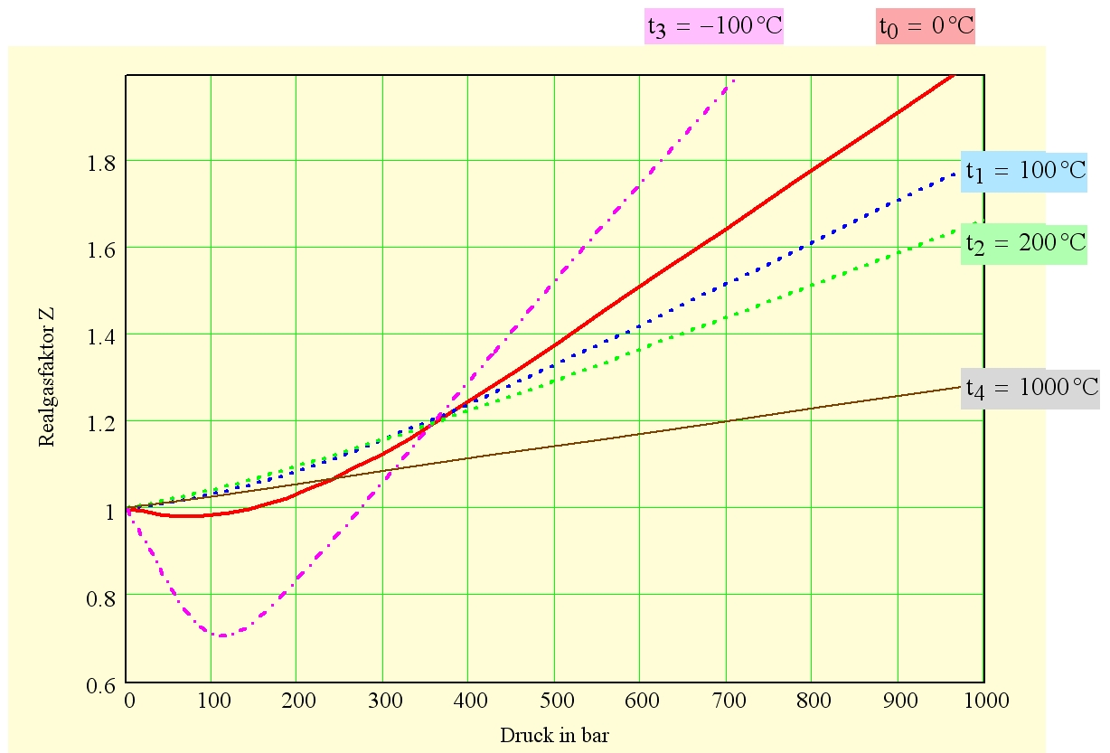 Realgasfaktor von Stickstoff